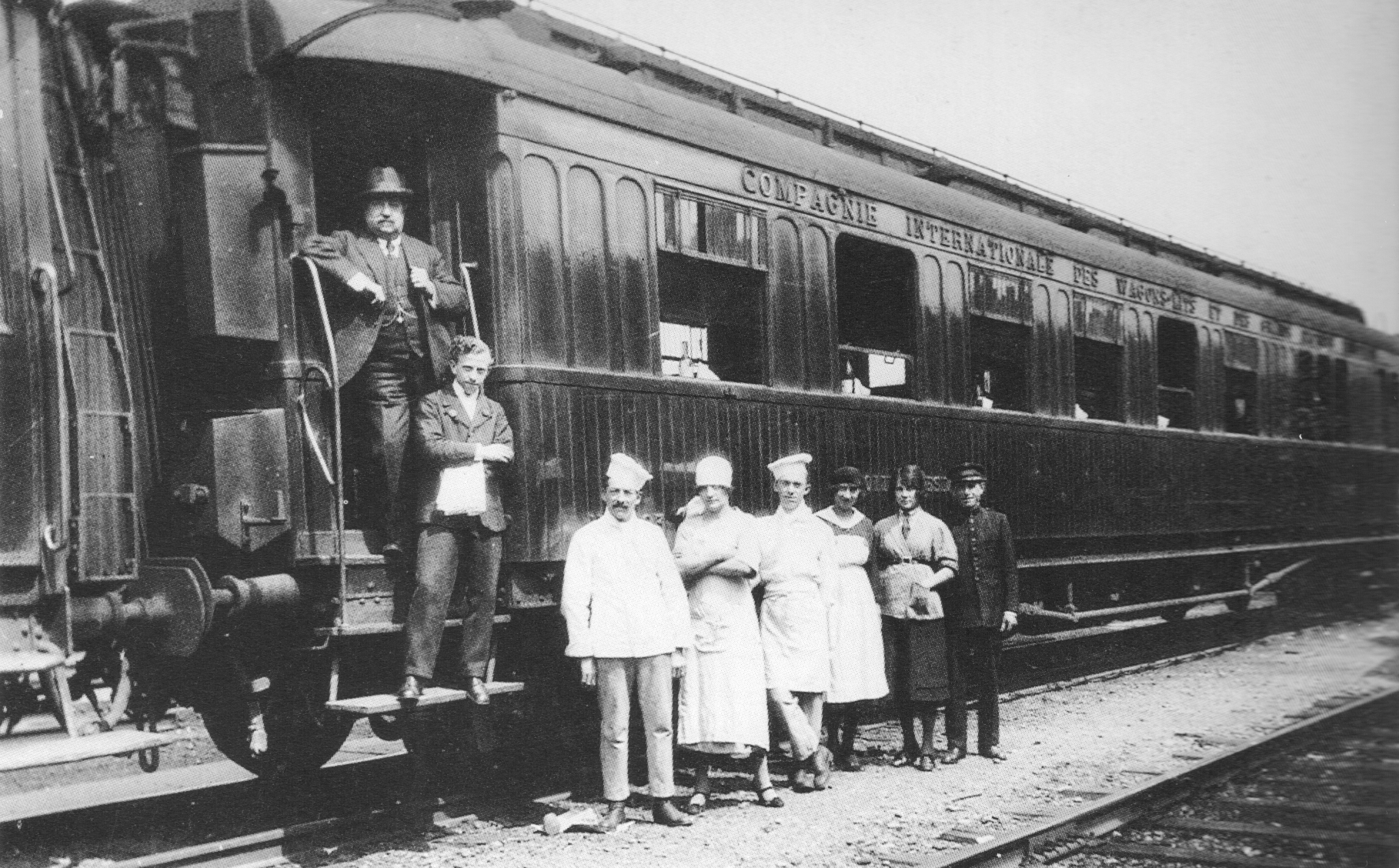 La brigade du train présidentiel en 1919, en haut des marches, Charles Bouvier, Inspecteur de la Compagnie des Wagons-Lits en charge de l'organisation des voyages présidentiels et des trains spéciaux de 1912 à 1929